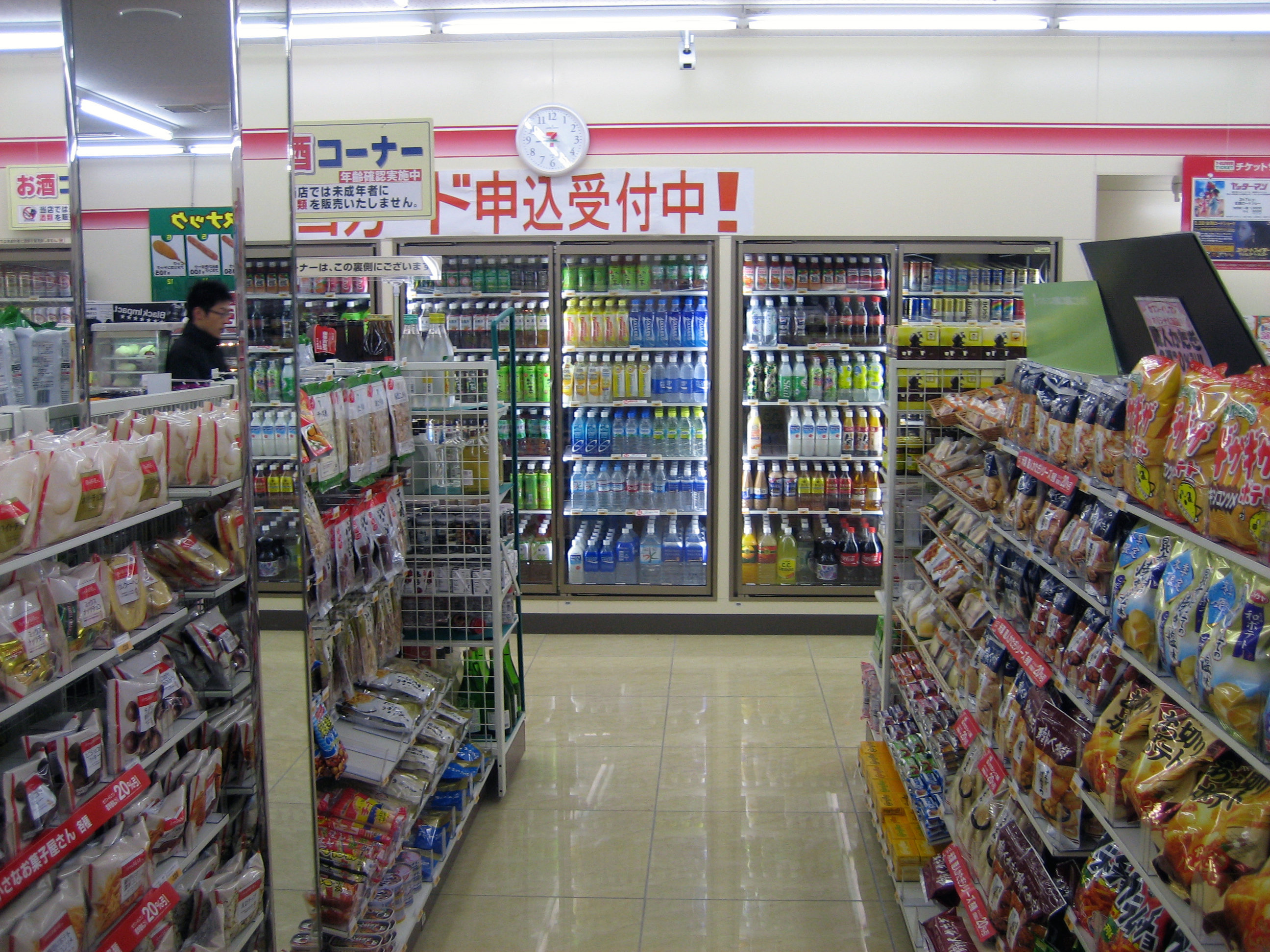 日本のコンビニストアチェーンのセブンイレブンの店内。